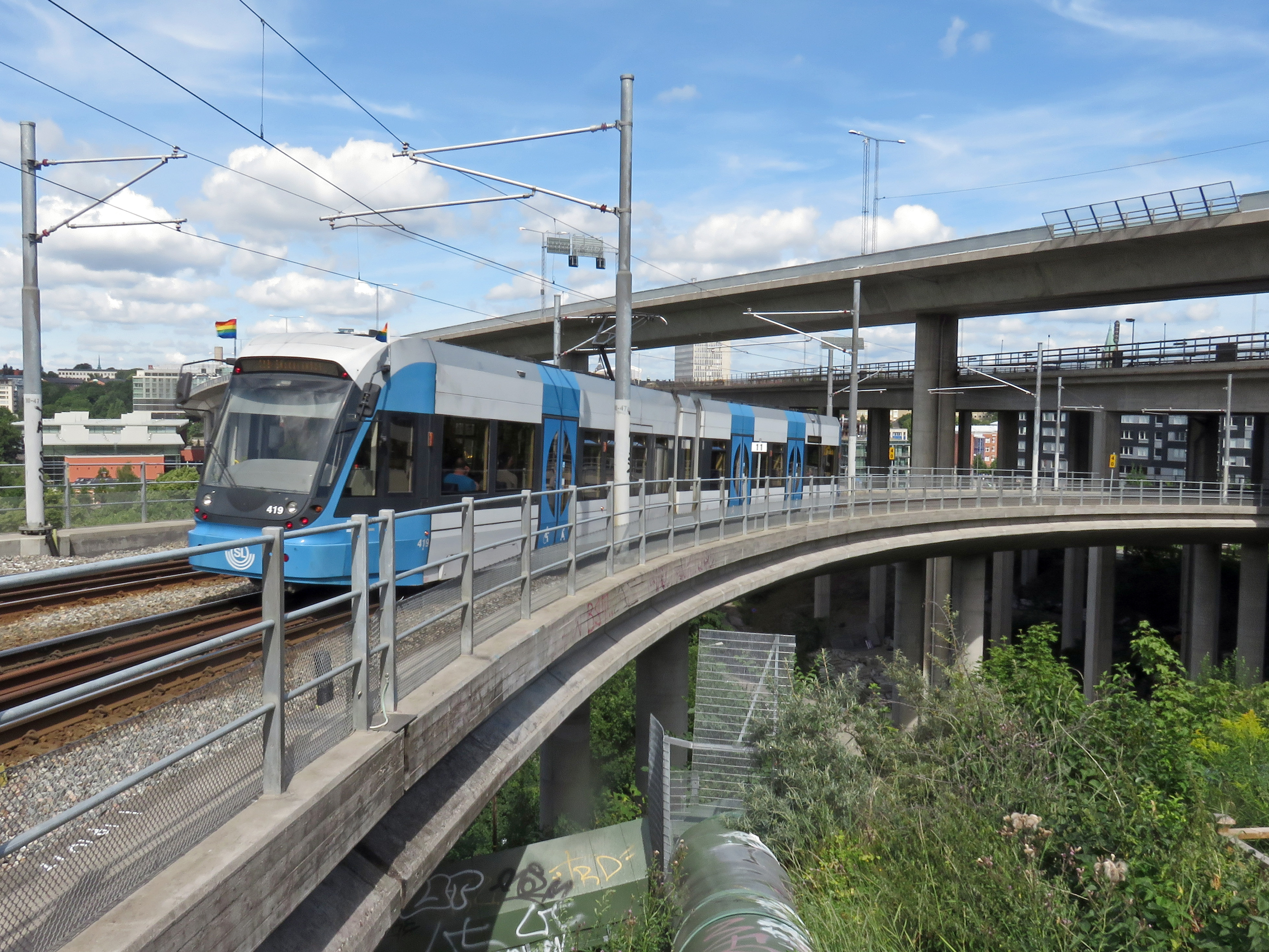 Fredriksdalsbron, Stockholm